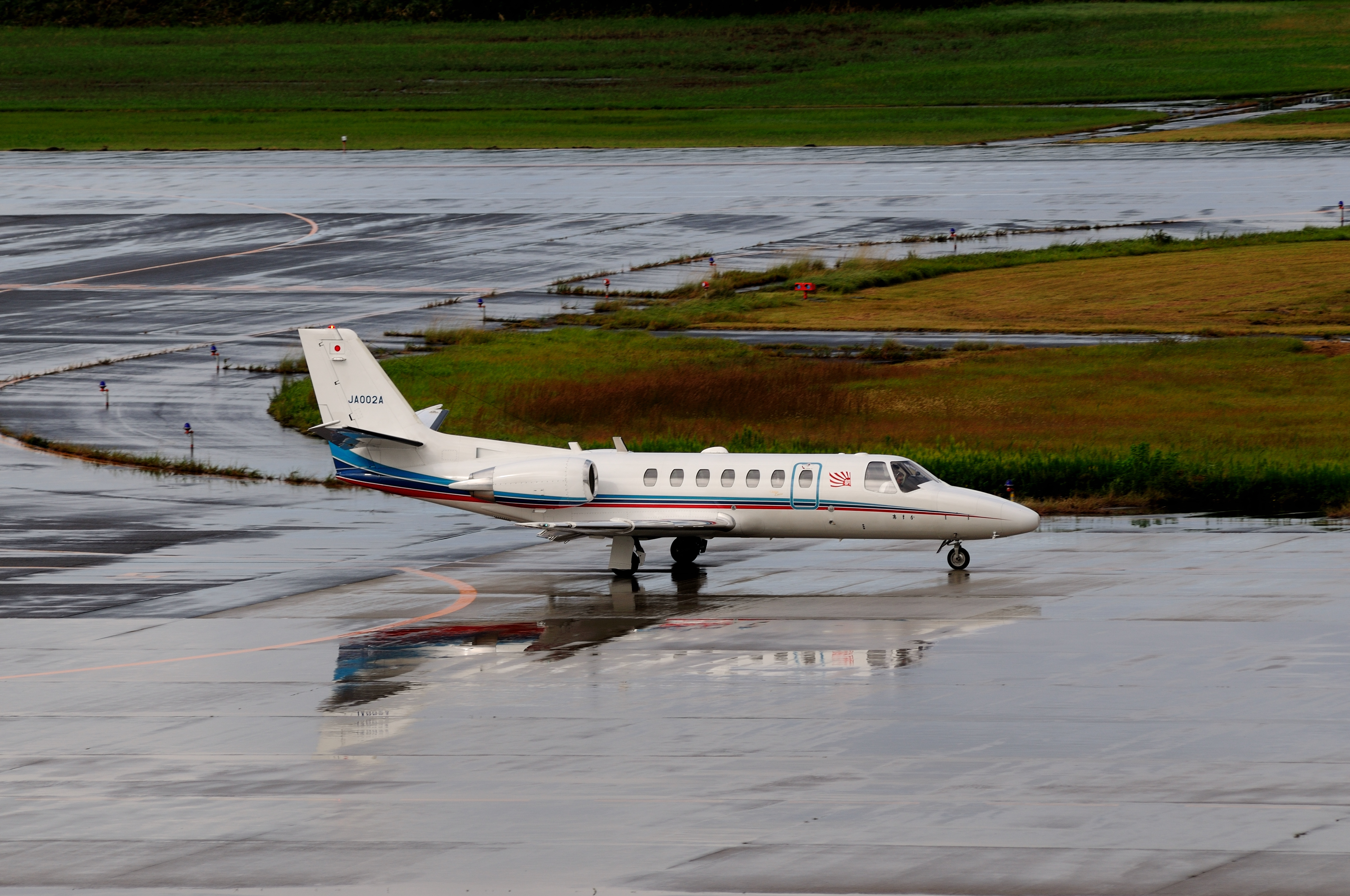 Asahi Shimbun Cessna 560 (JA002A/560-0597)